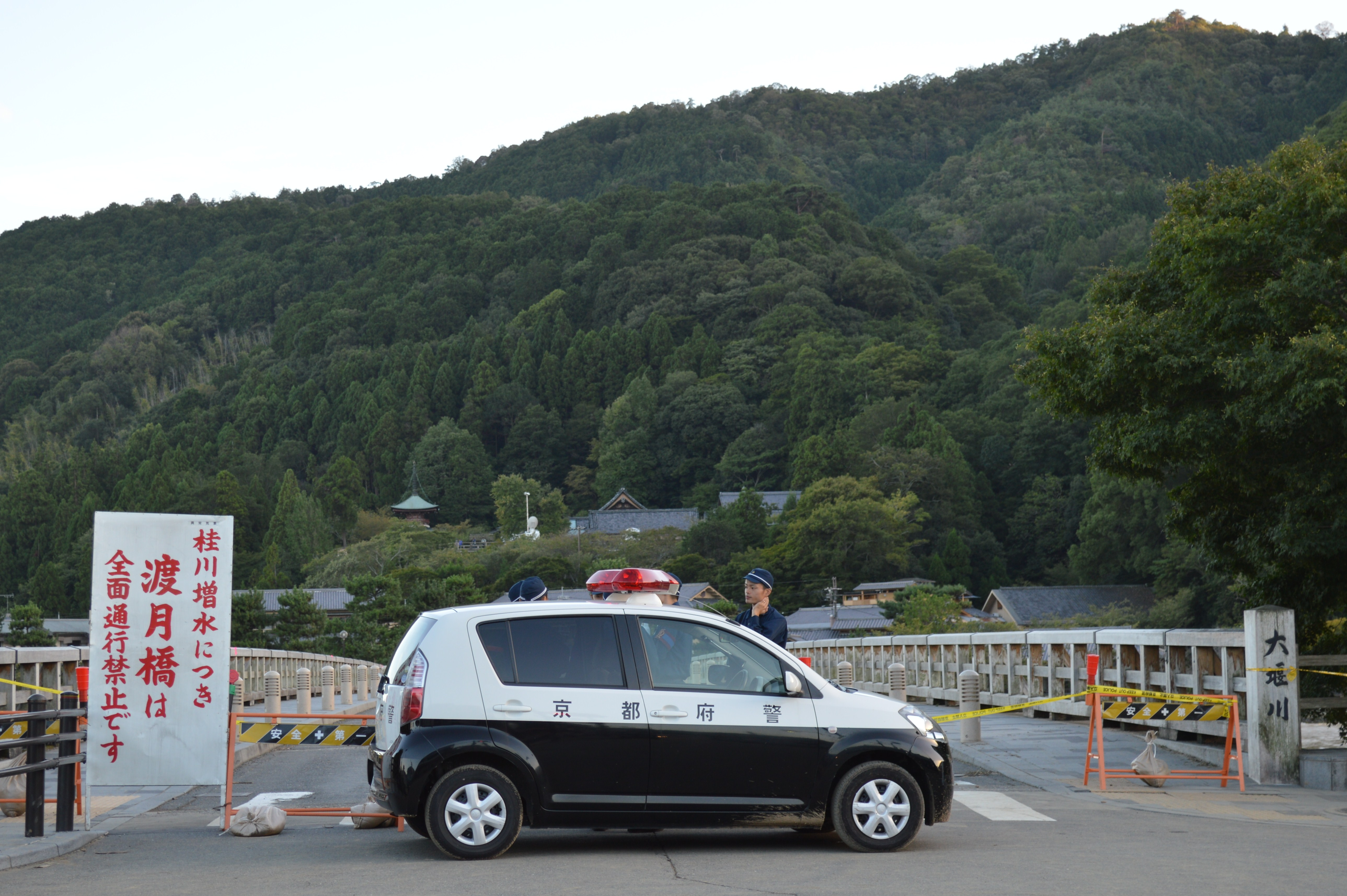 2013年9月16日、平成25年台風第18号の豪雨後の京都・桂川、封鎖された渡月橋